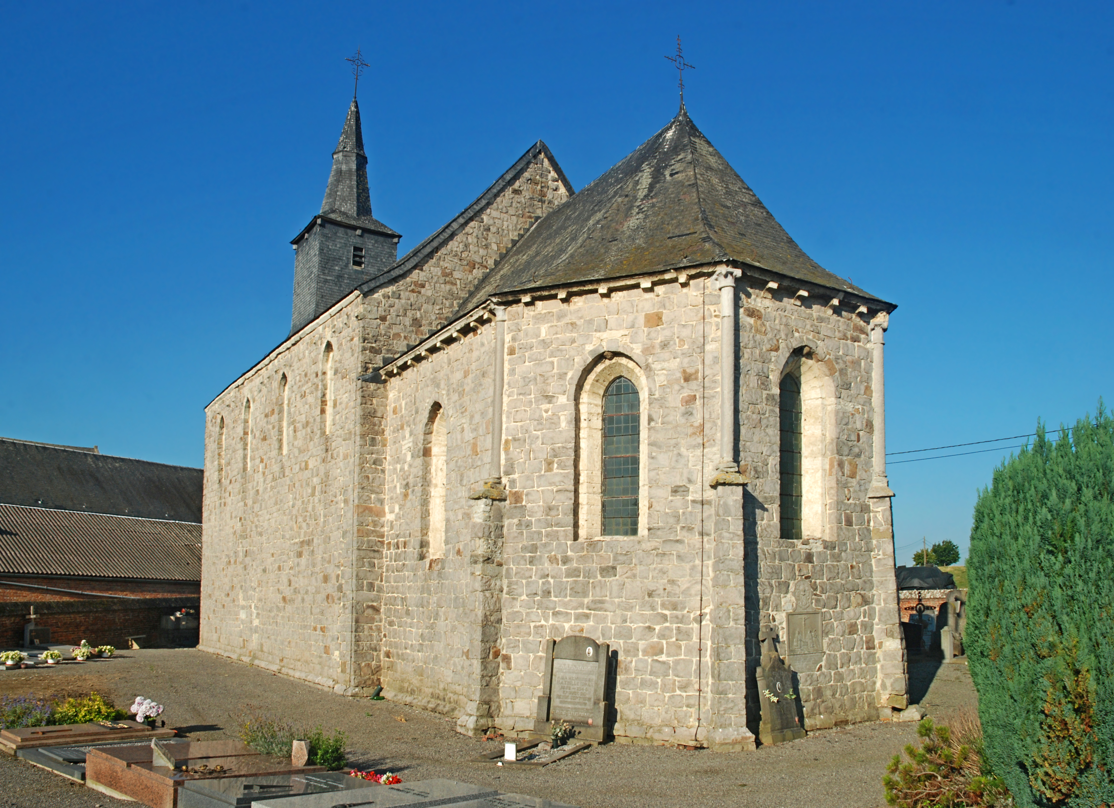 Belgique - Brabant wallon - Jodoigne - Piétrain - Chapelle Sainte-Catherine d'Herbais